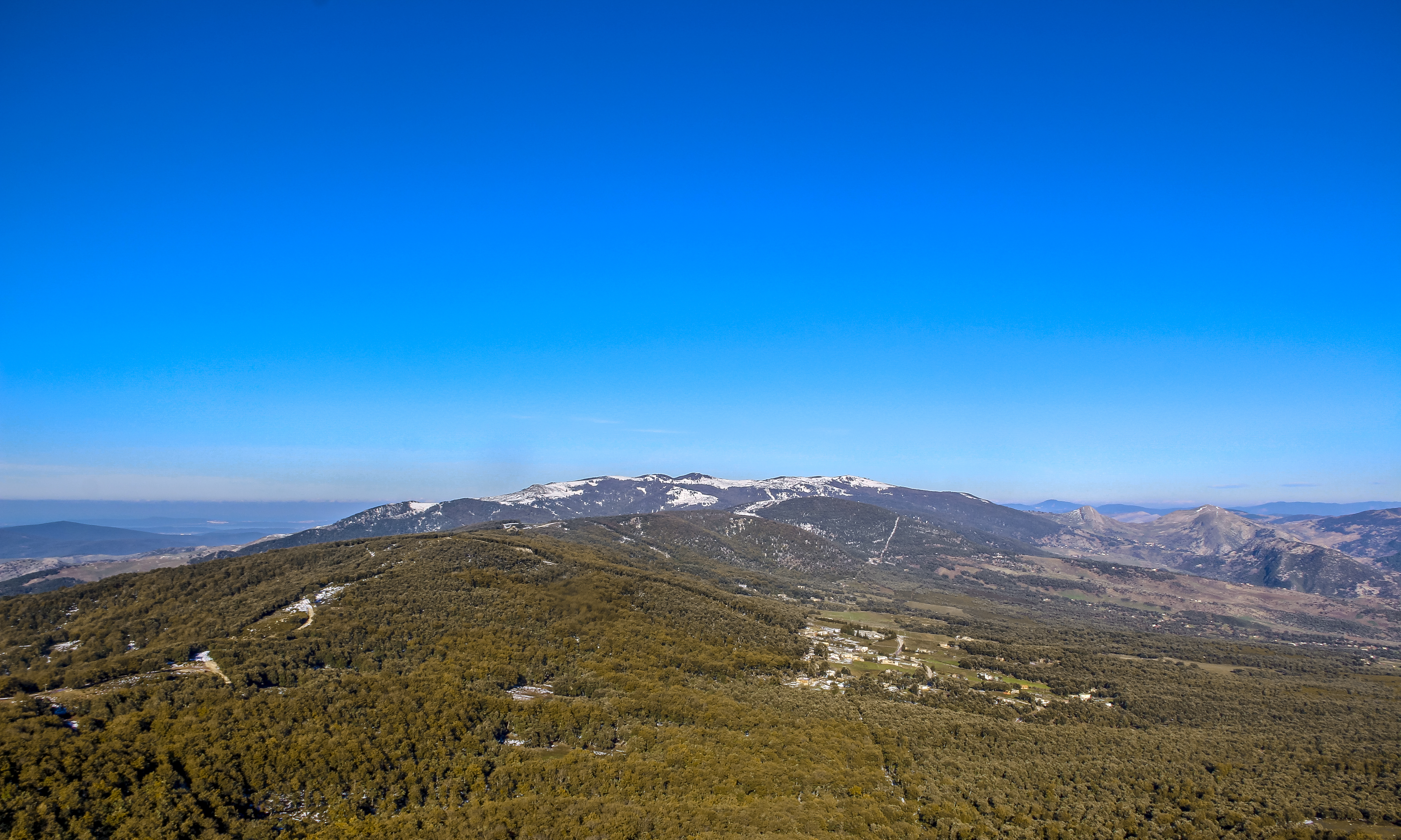 Djebel el Ghorra 1300 metre d'altitude Ghardimaou , Tunisie